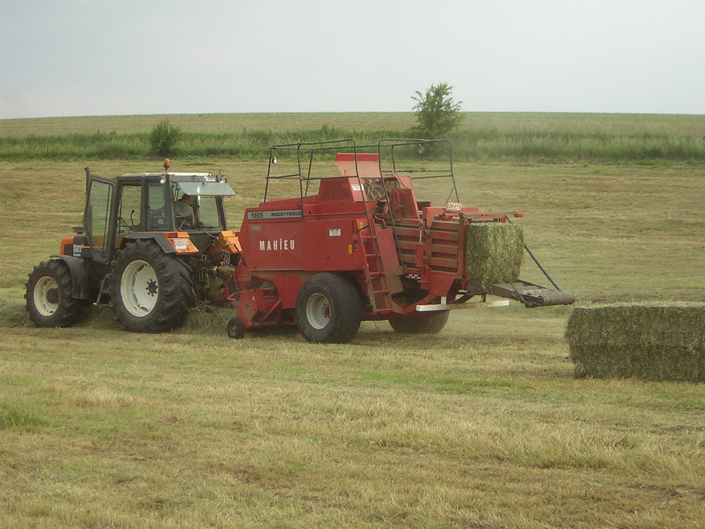 Tracteur Renault 155-54 Turbo, Presse Massey Ferguson 185 MB